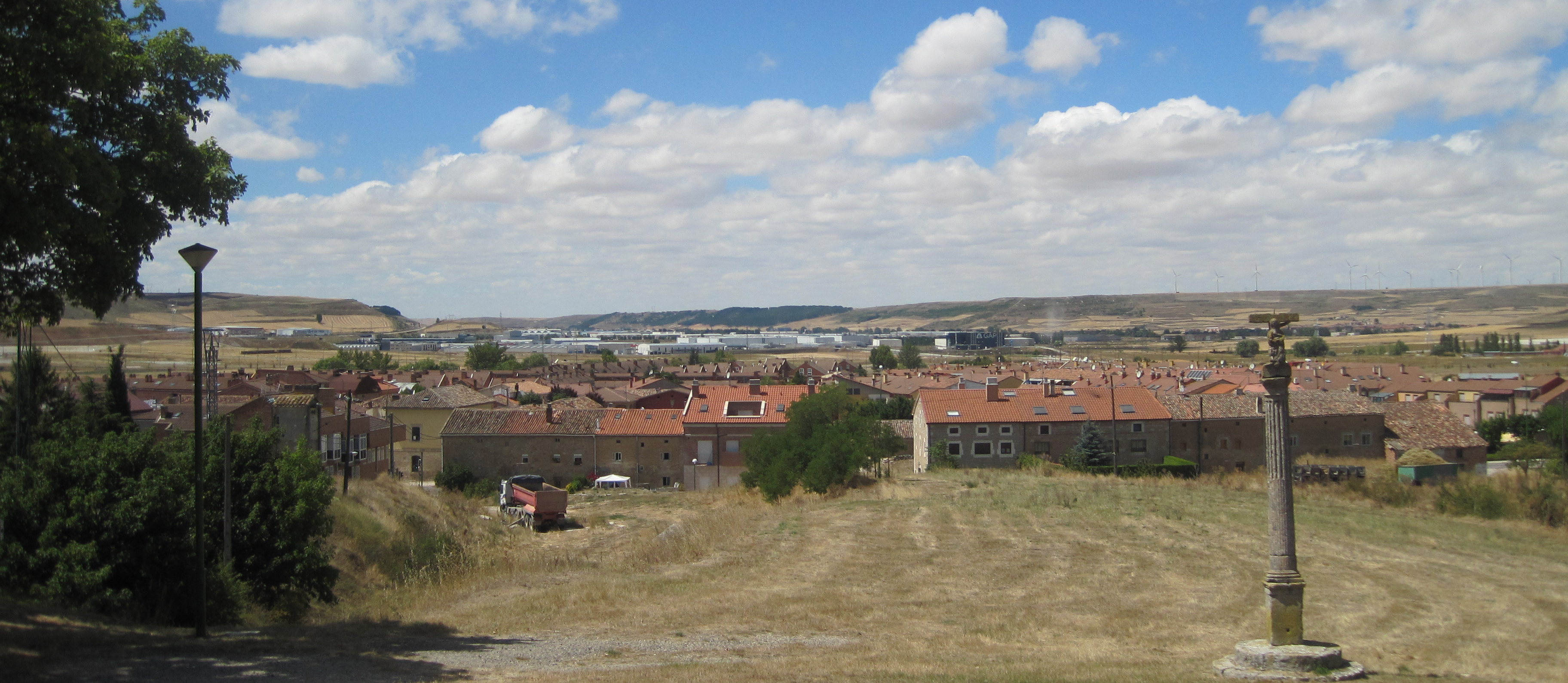 Panorámica del barrio burgalés de Villatoro, con el polígono industrial de Villaonquéjar al fono.